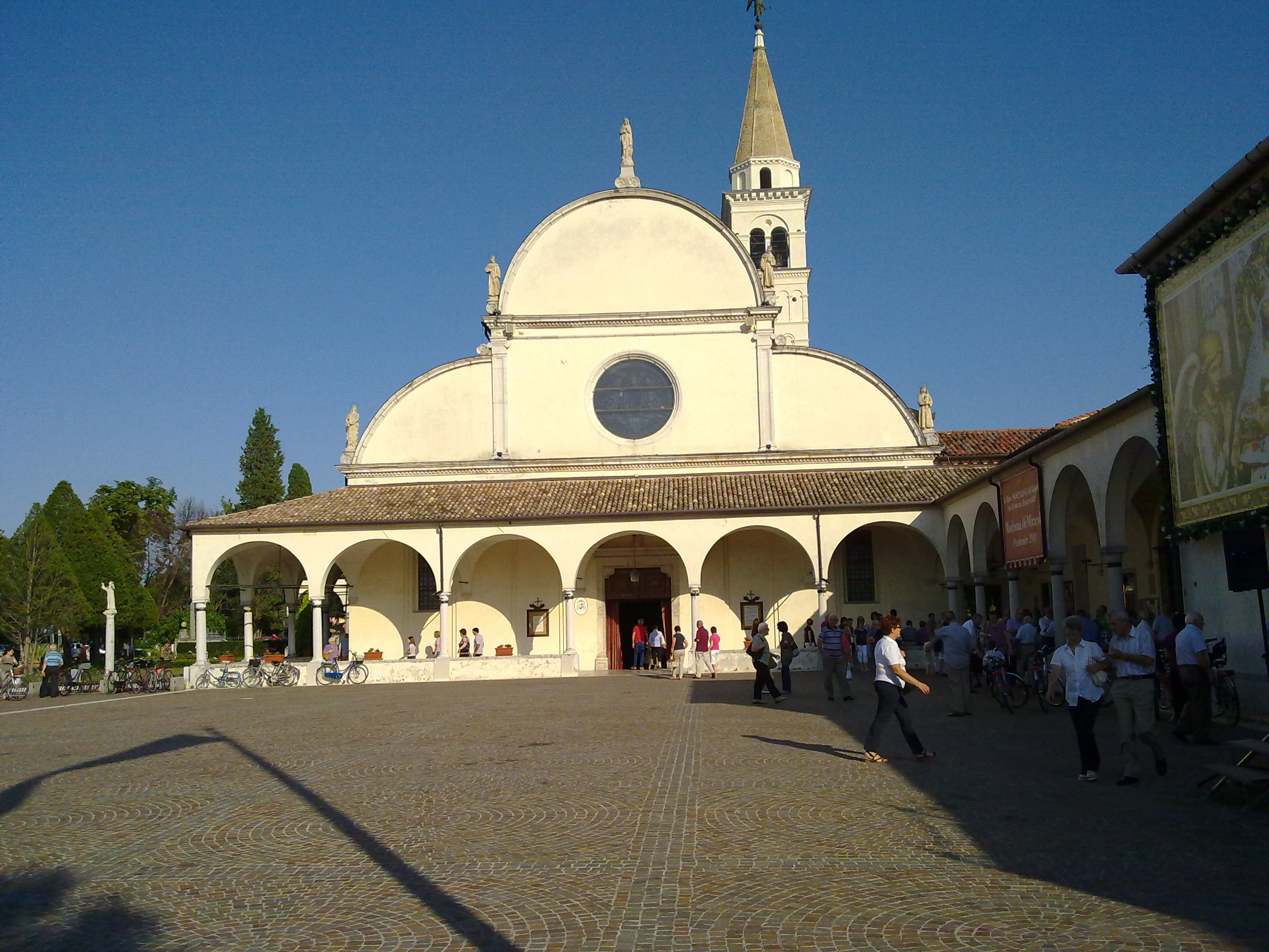 Duomo - Motta di Livenza